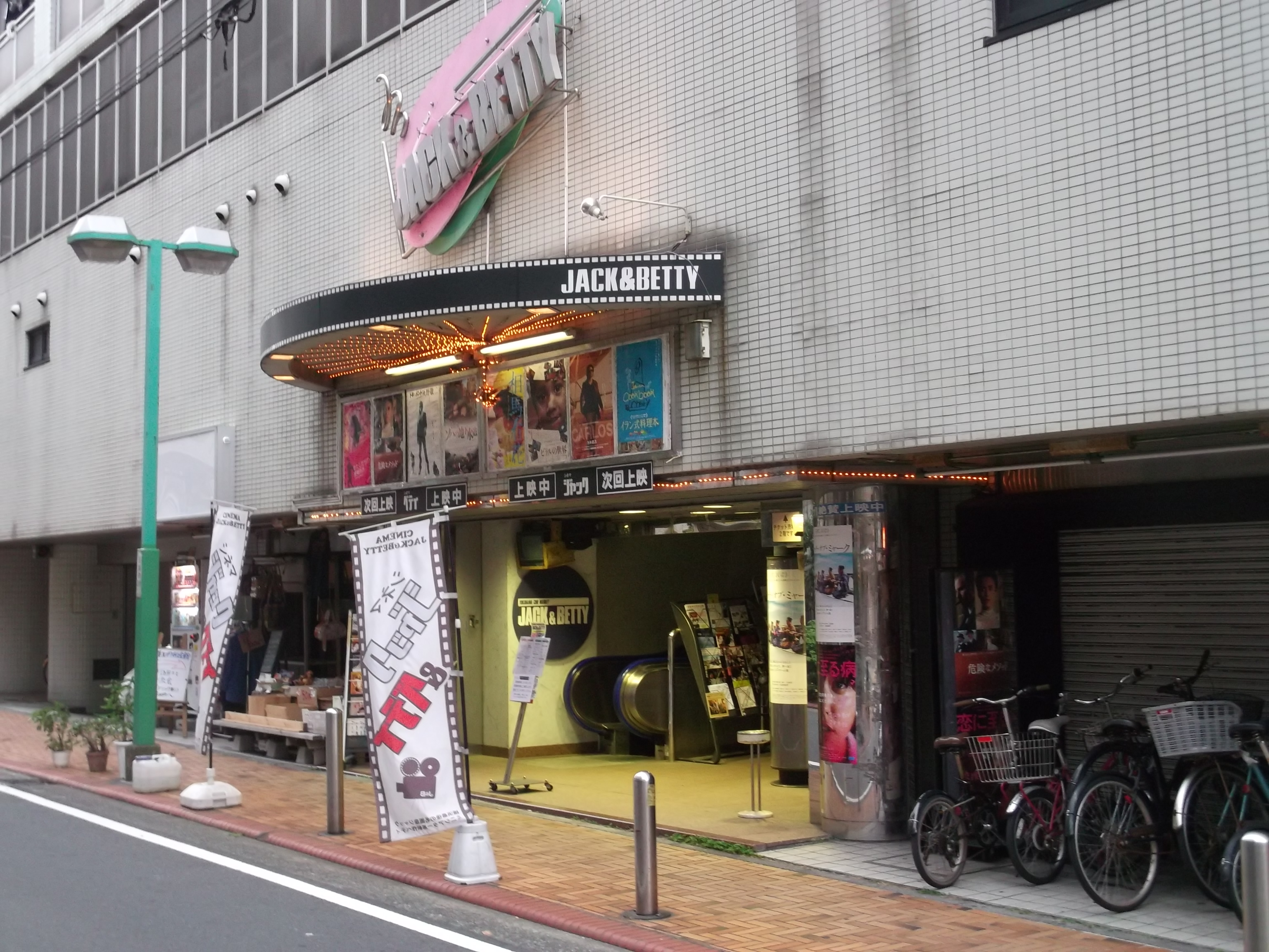 シネマ・ジャック&ベティ